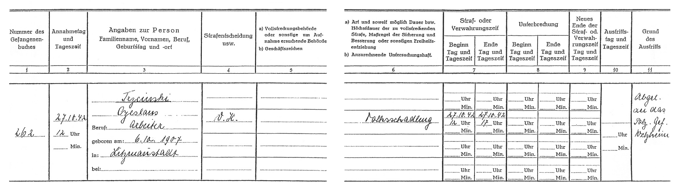 Auszug aus dem Gefangenenbuch des Amtsgerichtsgefängnisses Schorndorf mit den Angaben über die Aufnahme und die Weiterleitung von Czesław Trzciński vom 27. Oktober 1942 (Staatsarchiv Ludwigsburg, Signatur F299 Band 68)